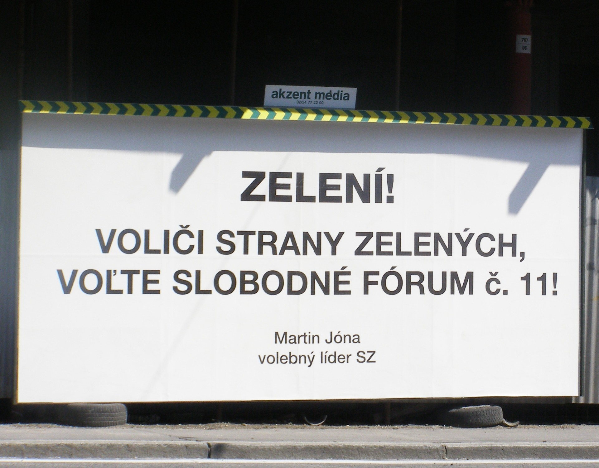 Slovak Green Party (Strana zelených) billboard, Bratislava